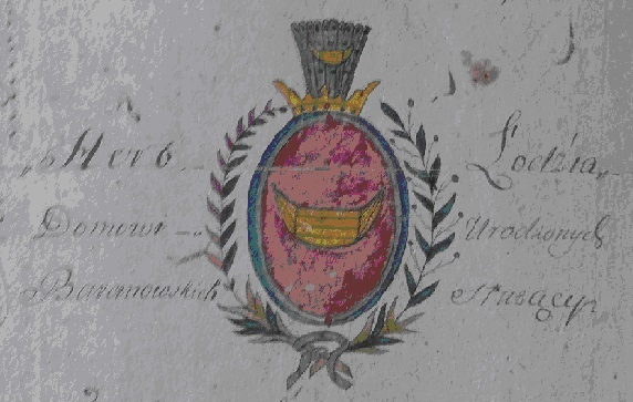 Герб лодзя1